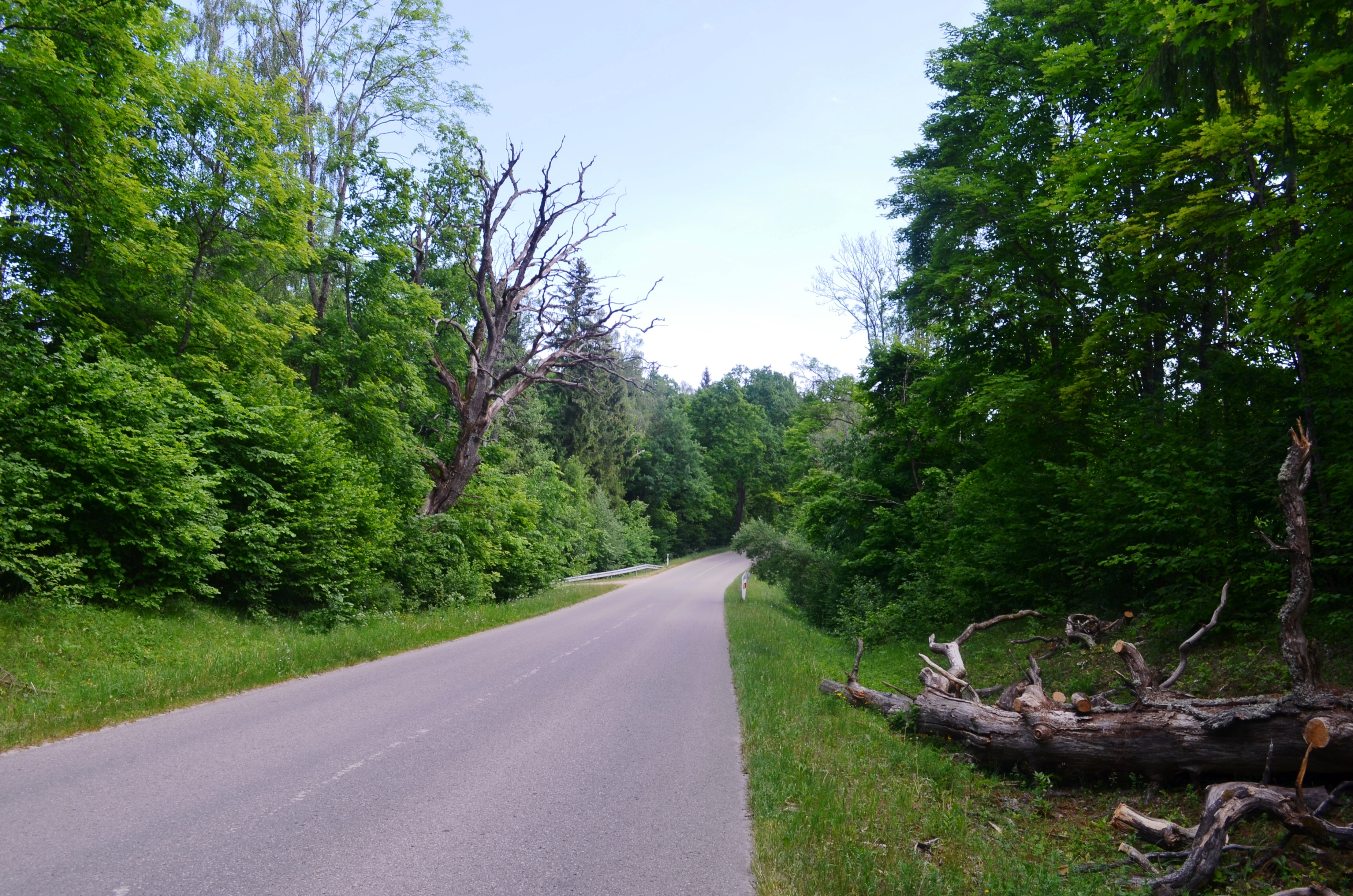 Sužionių miškas, Vilniaus raj.